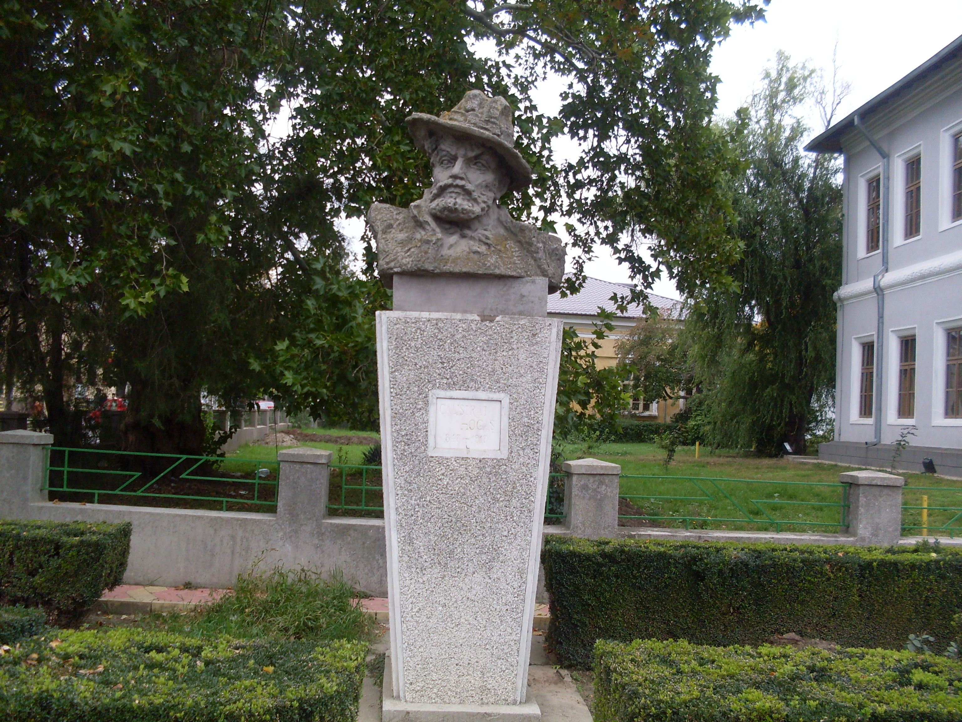 Bustul lui Calistrat Hogaș